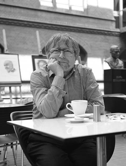 Adam Baruch (2015) fot. Jarek Rerych